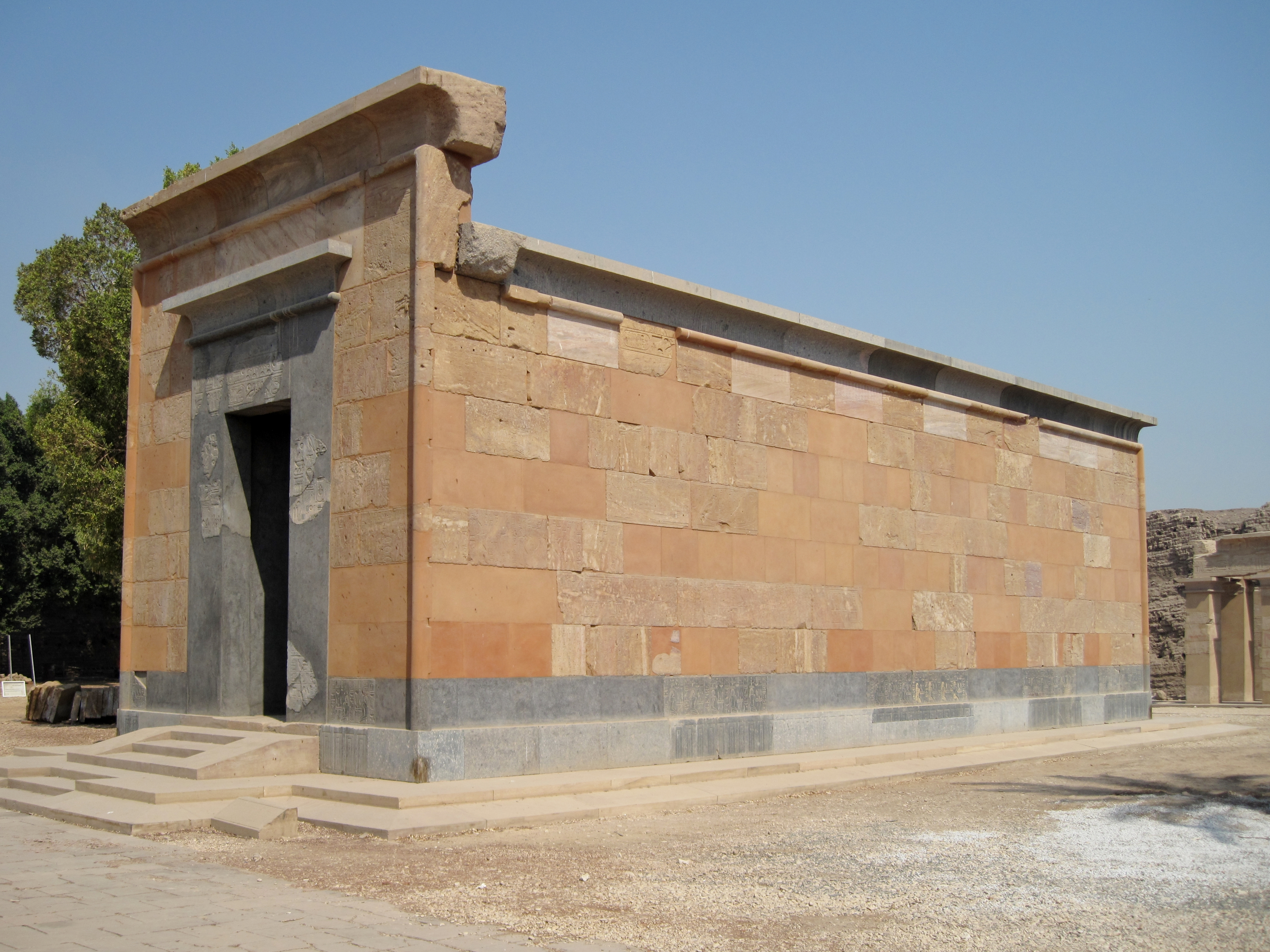 Im Jahr 2000 wiedererrichtete Rote Kapelle der Hatschepsut im Freilichtmuseum von Karnak, nördlich von Luxor, Ägypten